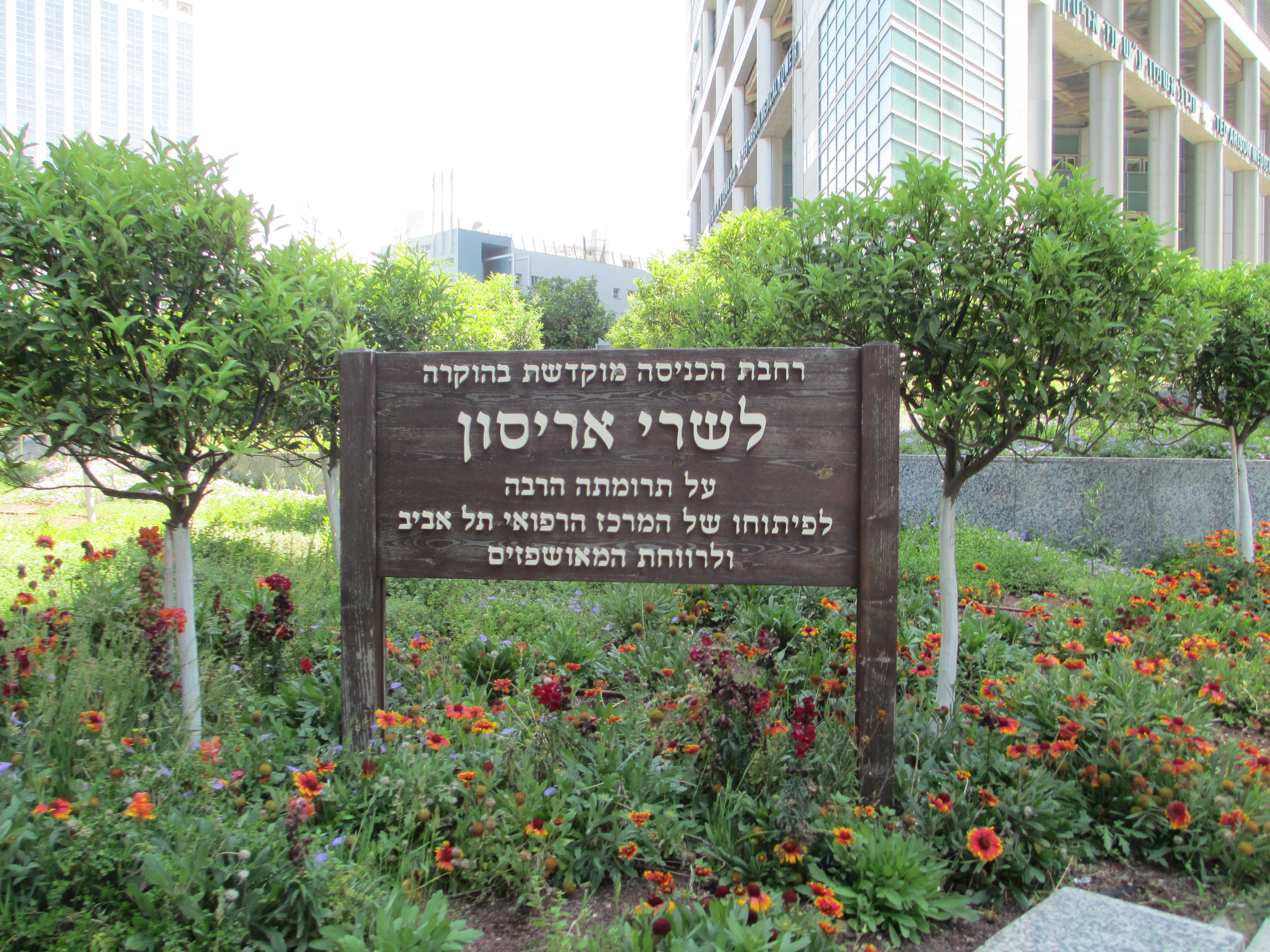 לוח הקדשה לשרי אריסון במרכז הרפואי תל אביב